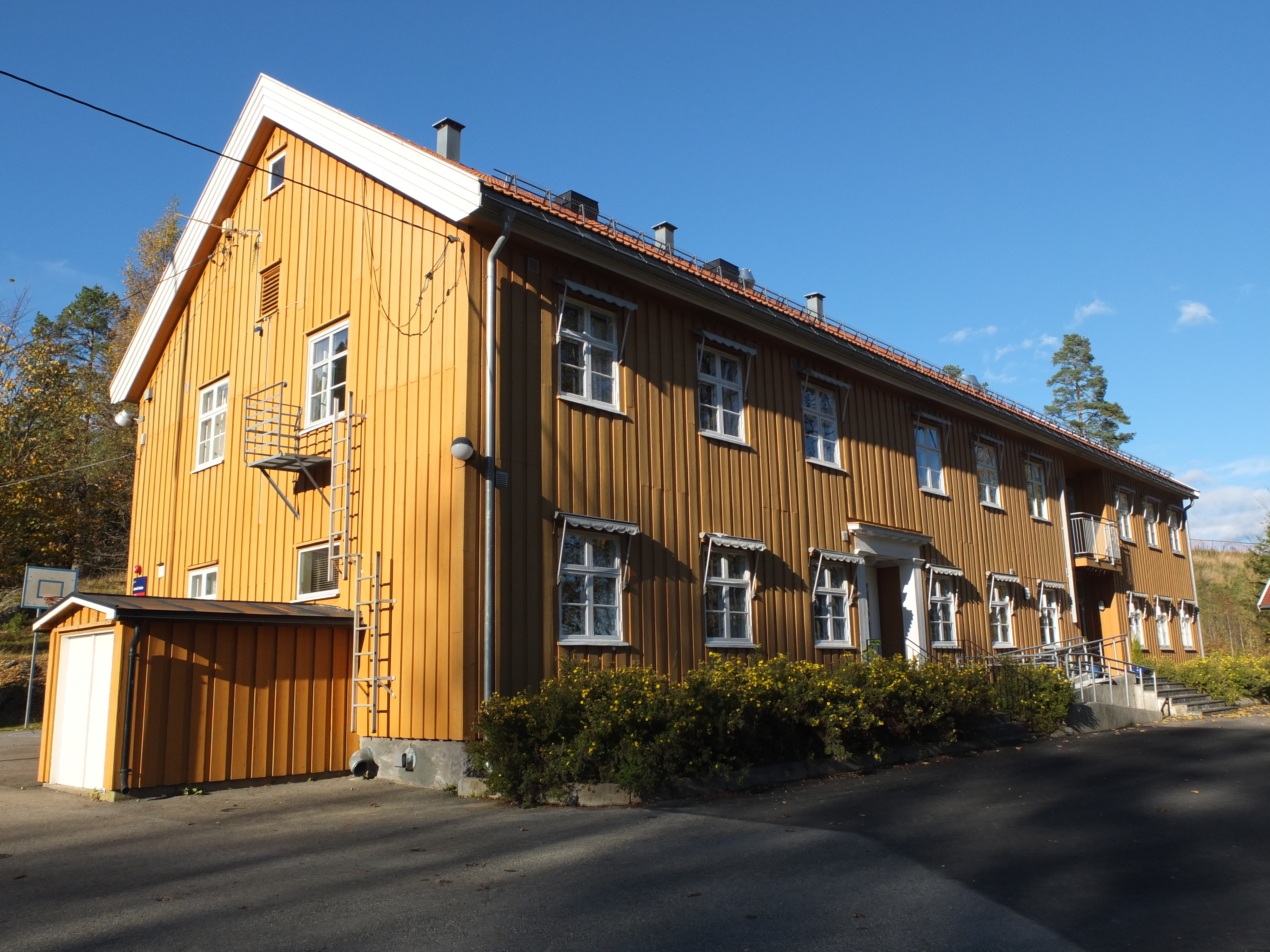 Sedsvoll skole i Ullensaker